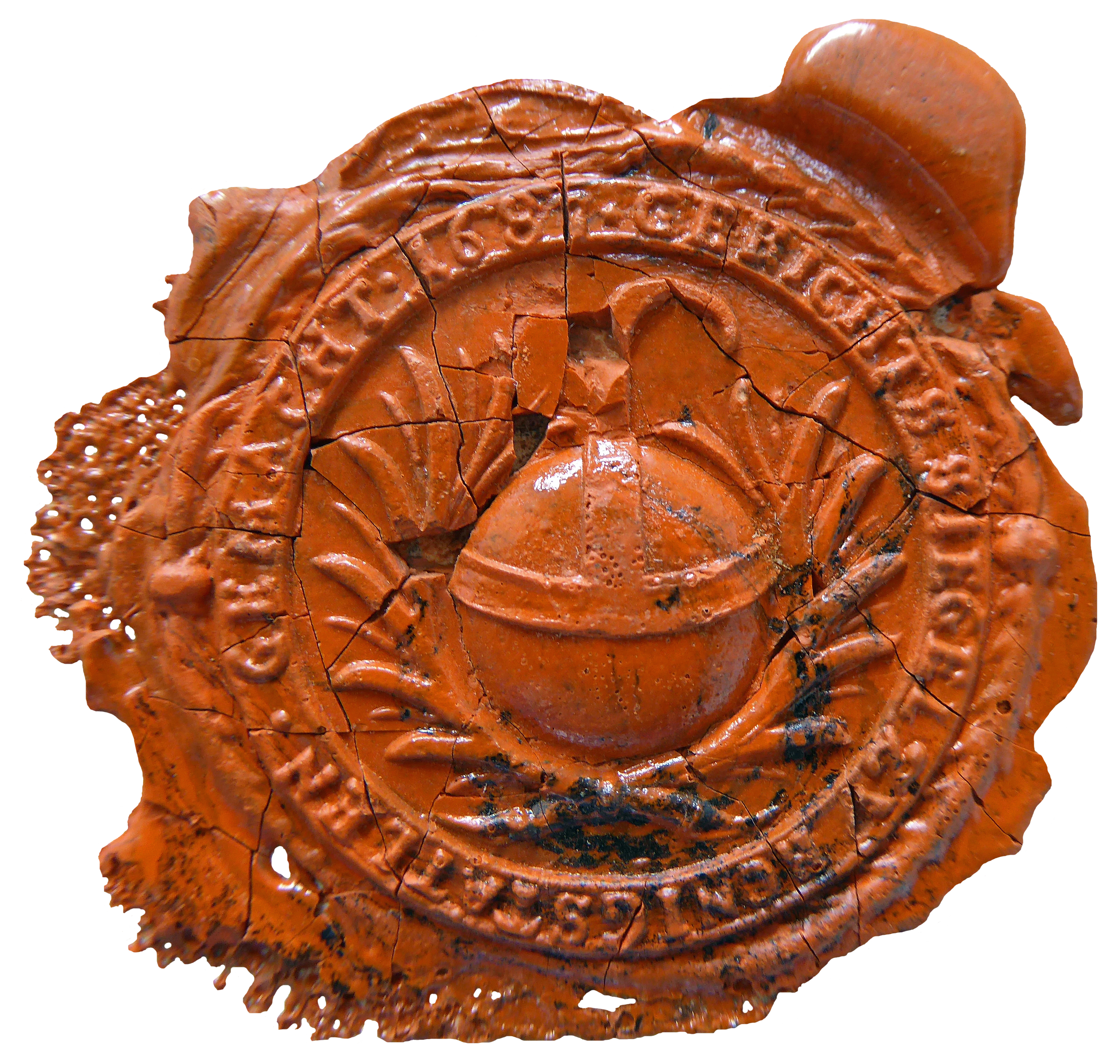 Gerichtssiegel (d = 35 mm) von Königstädten aus dem Jahr 1687, Umschrift: * GERICHTS SIEGEL ZV KÖNIGSTÄTLEN . GEMACHT . 1687. Das Siegel weist die seltene Besonderheit auf, dass in der Umschrift nicht nur das Entstehungsjahr genannt, sondern explizit auf die Anfertigung verwiesen wird.